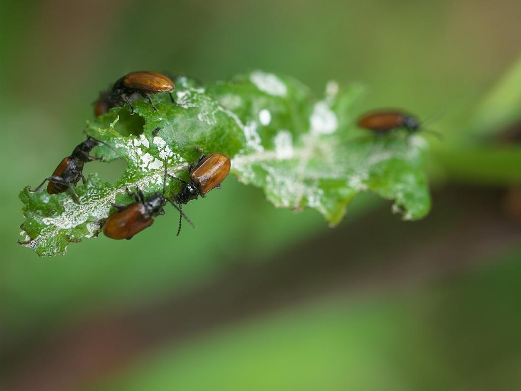 2020/05/19 和歌山県田辺市：Tanabe City. Wakayama Pref. Japan